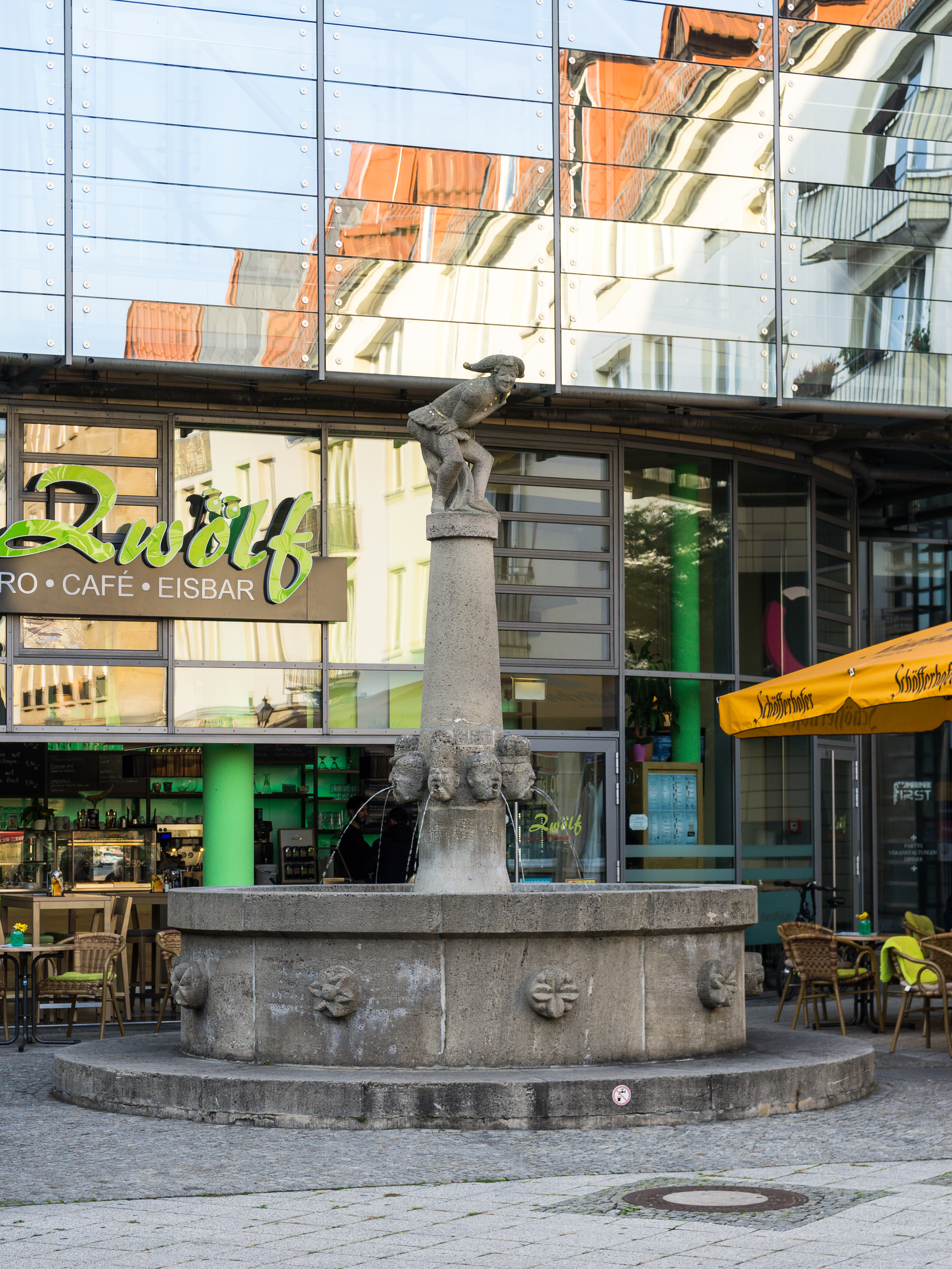 Eulenspiegel-Brunnen, Alter Markt in Magdeburg Stt Magdeburger Altstadt